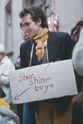 Andreas Junge, Bildender Künstler Wuppertal, 1991 Von-der-Heydt-Förderpreis, * 12.12.1959; † 2009, Aufnahme um 1980 auf einem Luisenfest